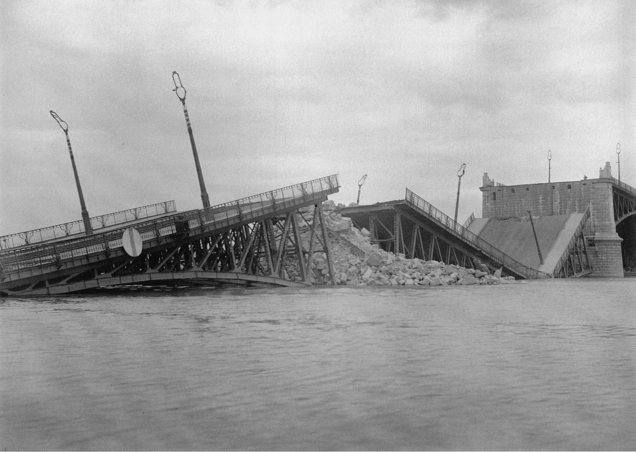 Zniszczony przez wycofujących się Rosjan most Poniatowskiego